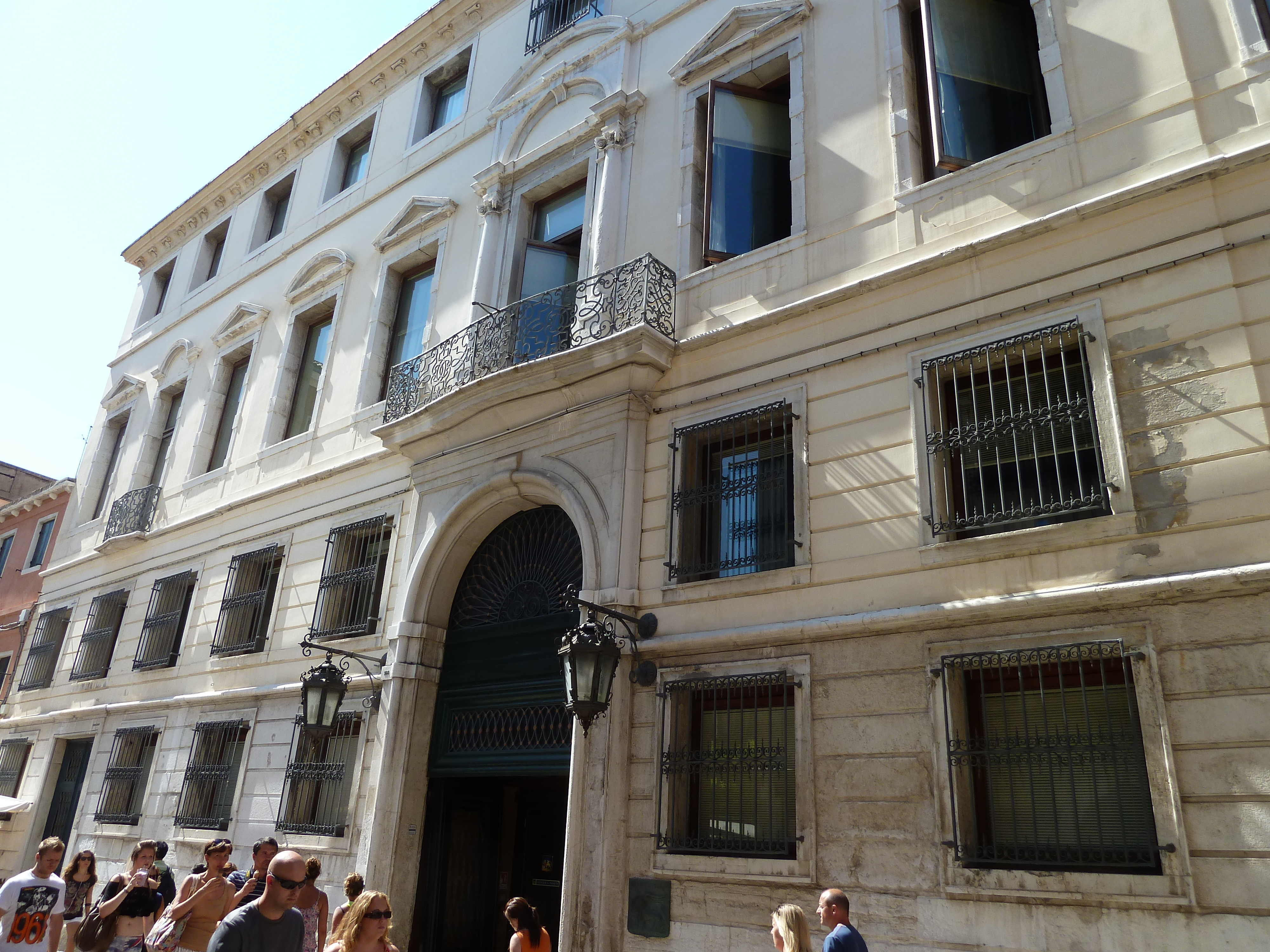 Pal Zeno